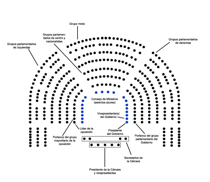 Distribución de asientos en el Congreso de los Diputados de España y situación del Gobierno y los grupos parlamentarios, en una legislatura con mayoría de derechas.